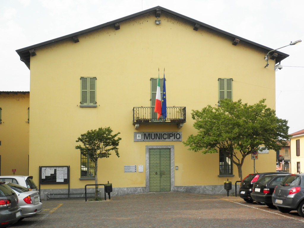 Il municipio di Dovera